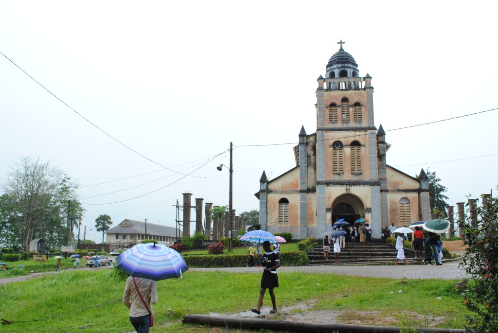 Cathédrale d'Édéa